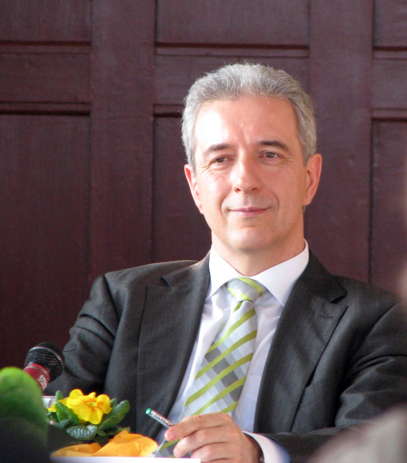 Ministerpräsident von Sachsen Stanislaw Tillich